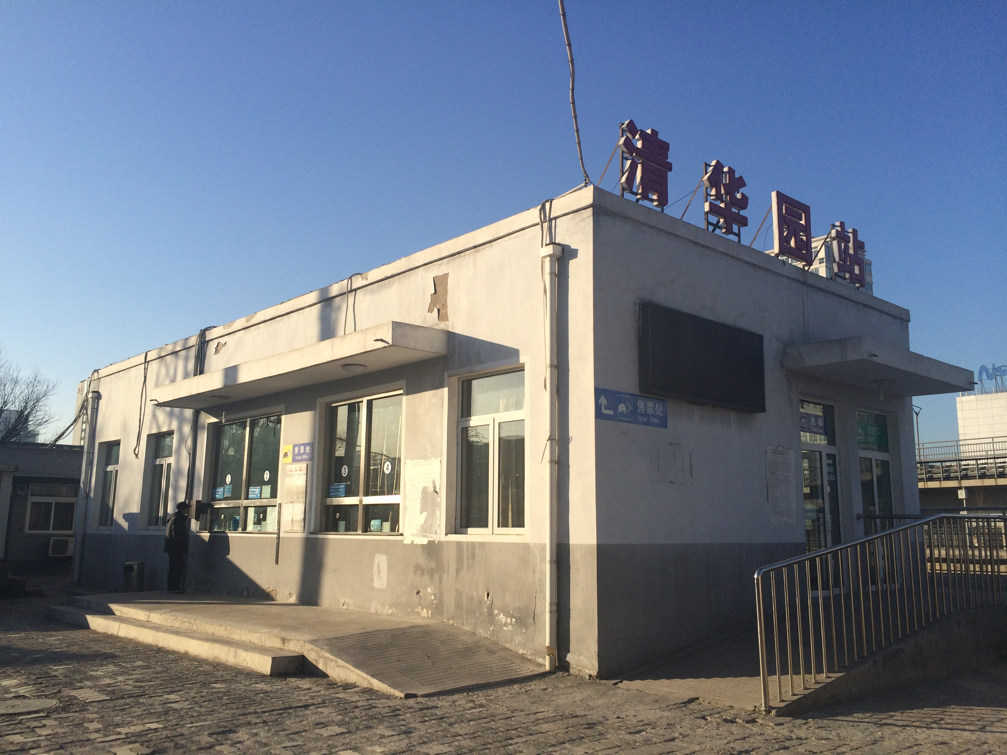 清华园站第三代站房，建于2012年